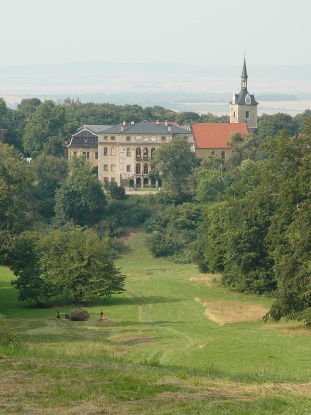 Schloss Ettersburg Bild ist von mir selbst fotografiert wurden. Sommer 2004